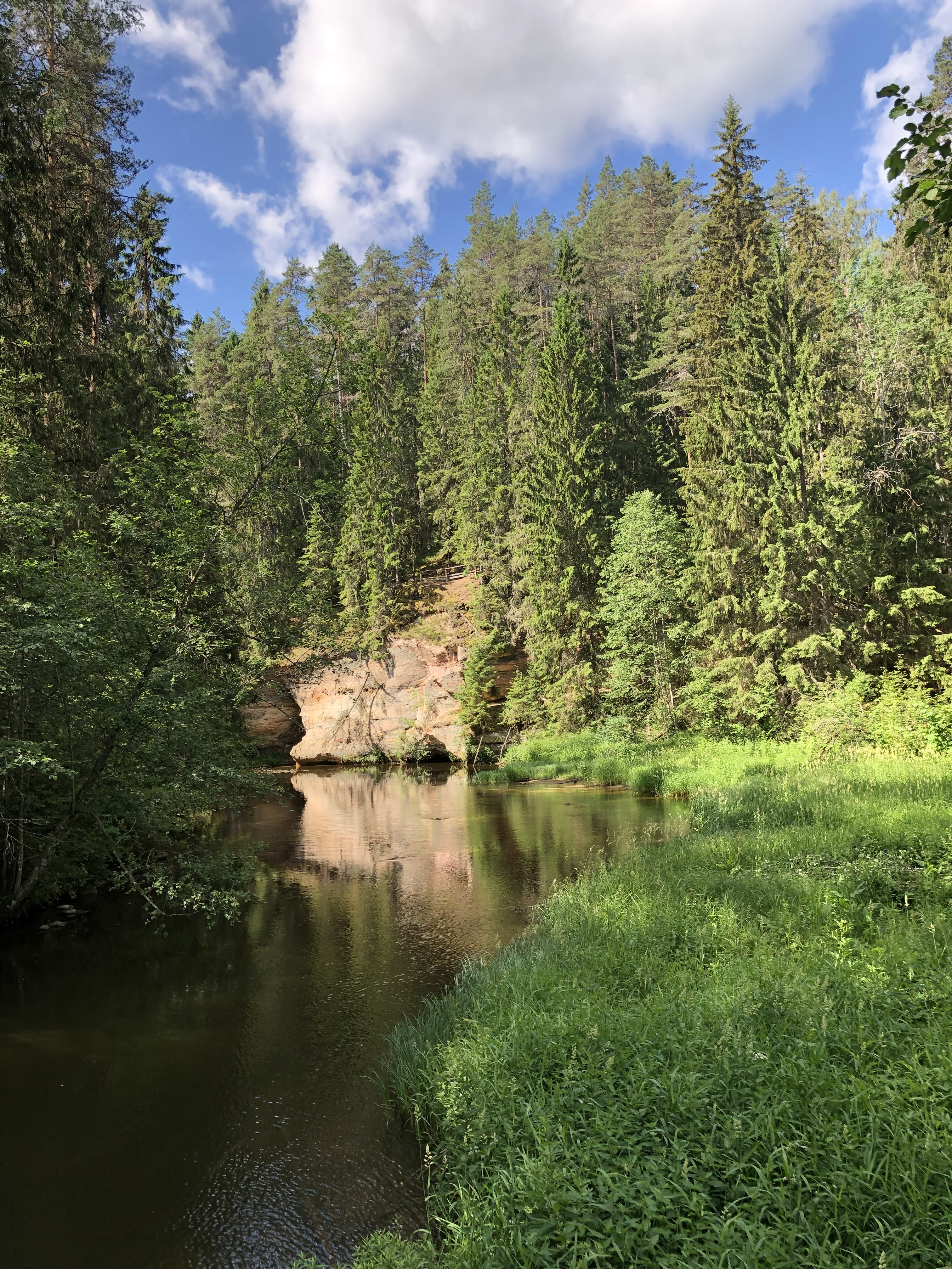 Väike Taevaskoda 2019